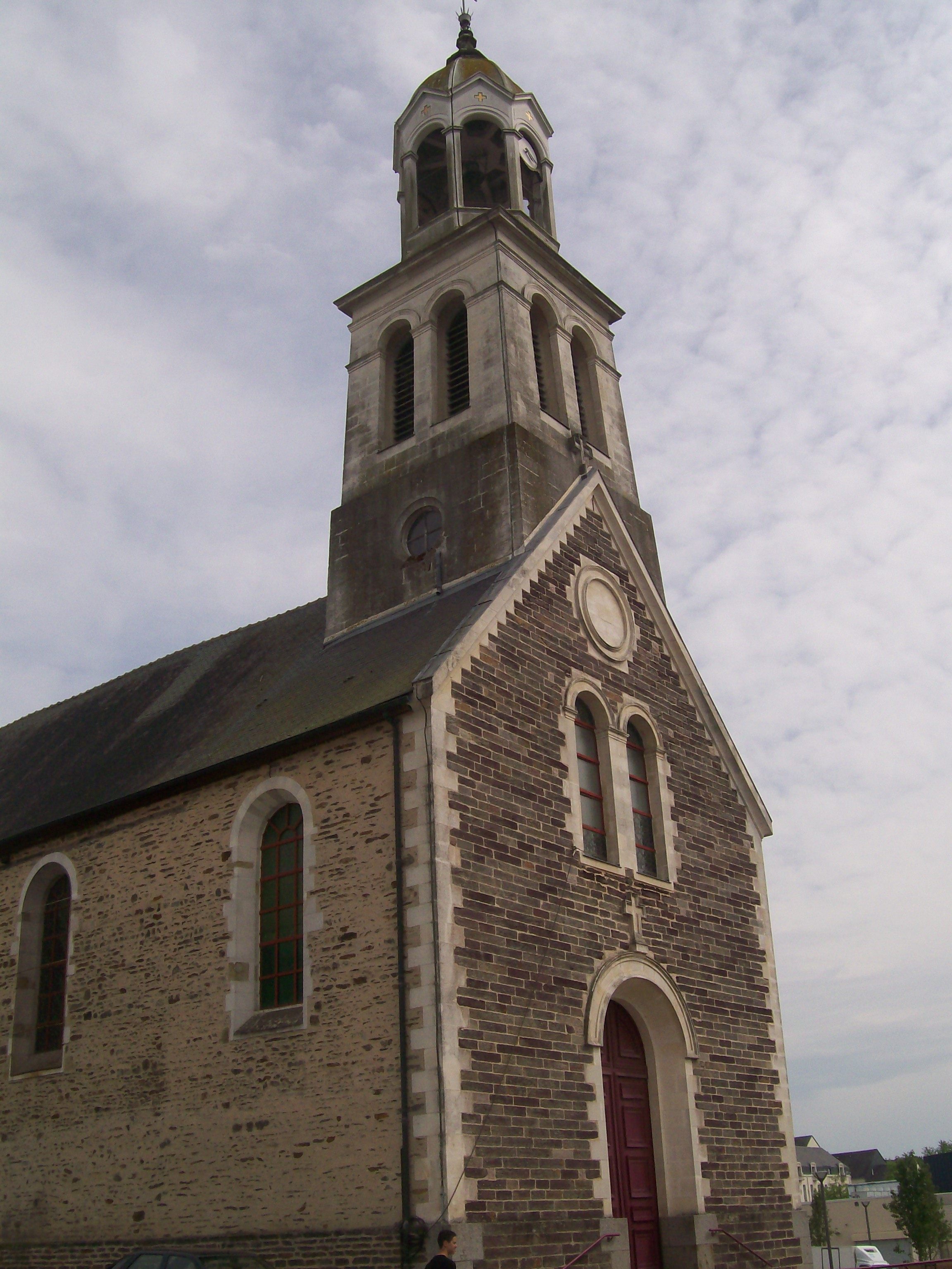 Vue du mur Nord de la nef de l'église St Martin de Vern.